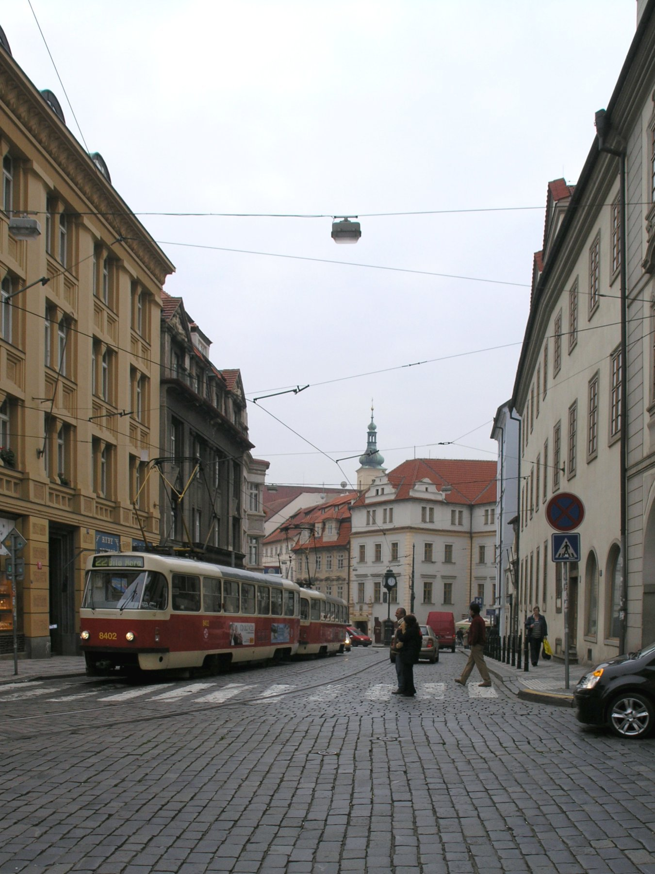 Karmelitská (Praha, Malá Strana)